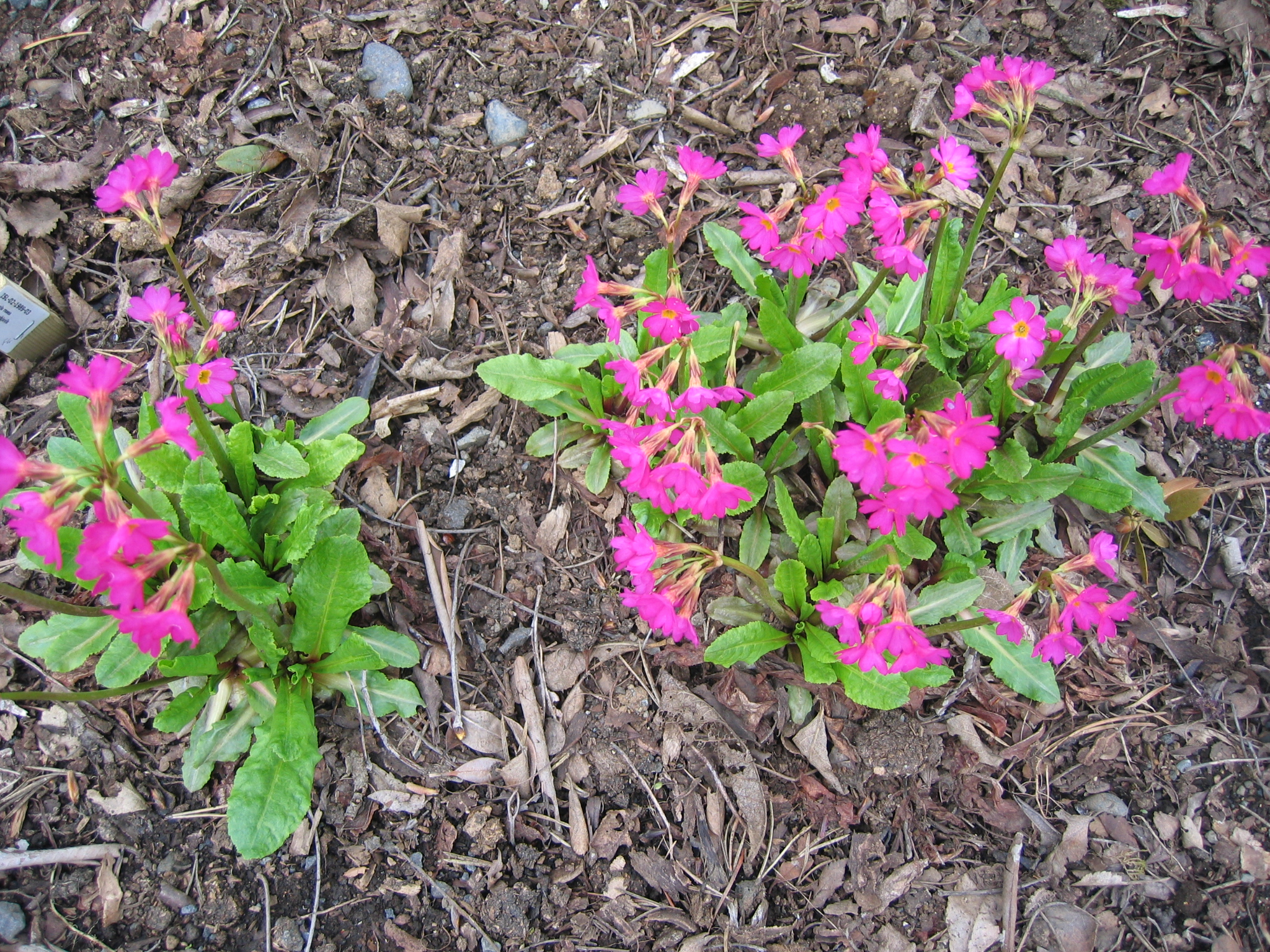 photo taken by Salvör in Grasagarður Reykjavíkur Botanical garden in Reykjavik, Iceland.